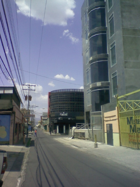 Vista de la calle Roscio en el centro de San Juan de los Morros